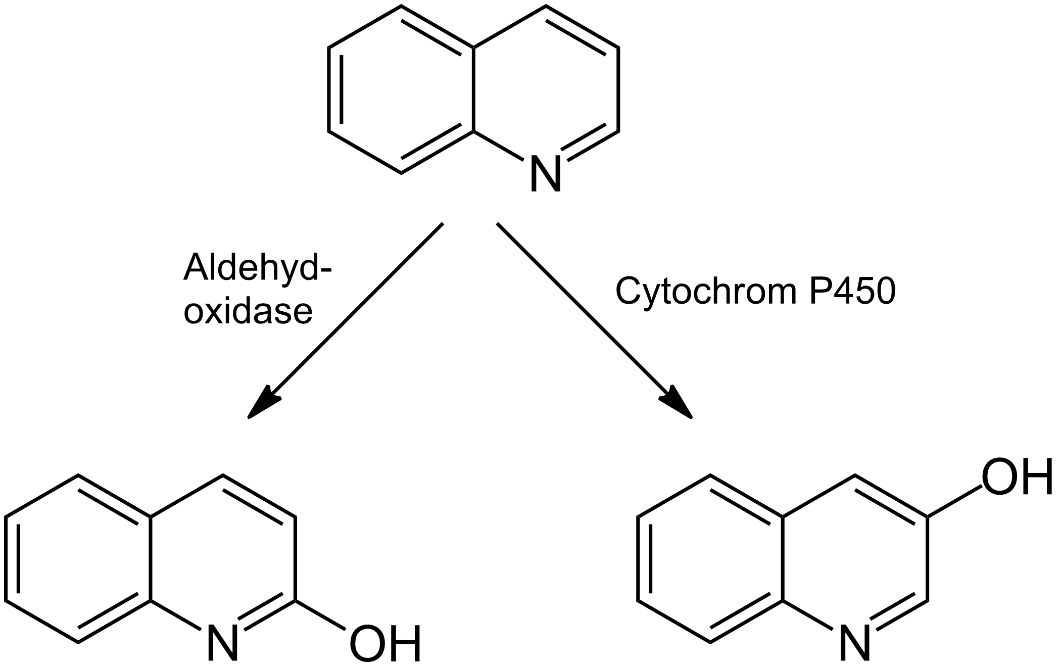 Metabolisierung von Chinolin